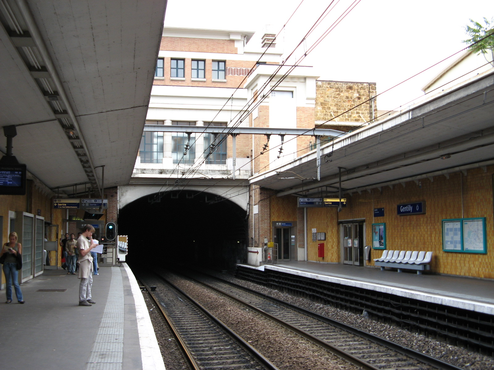 Gare de Gentilly vue des quais, RER B, France